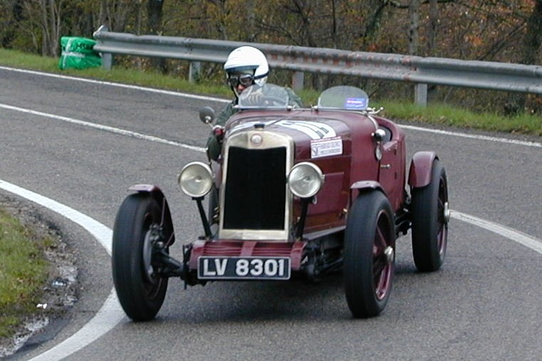 Lea-Francis Hyper S La foto è stata scattata da me il 17.4.2004 durante le prove della corsa in salita "Cronoscalata della Castellana" che si tiene ogni anno con partenza da Orvieto-Ciconìa e arrivo a Colonnetta di Prodo.